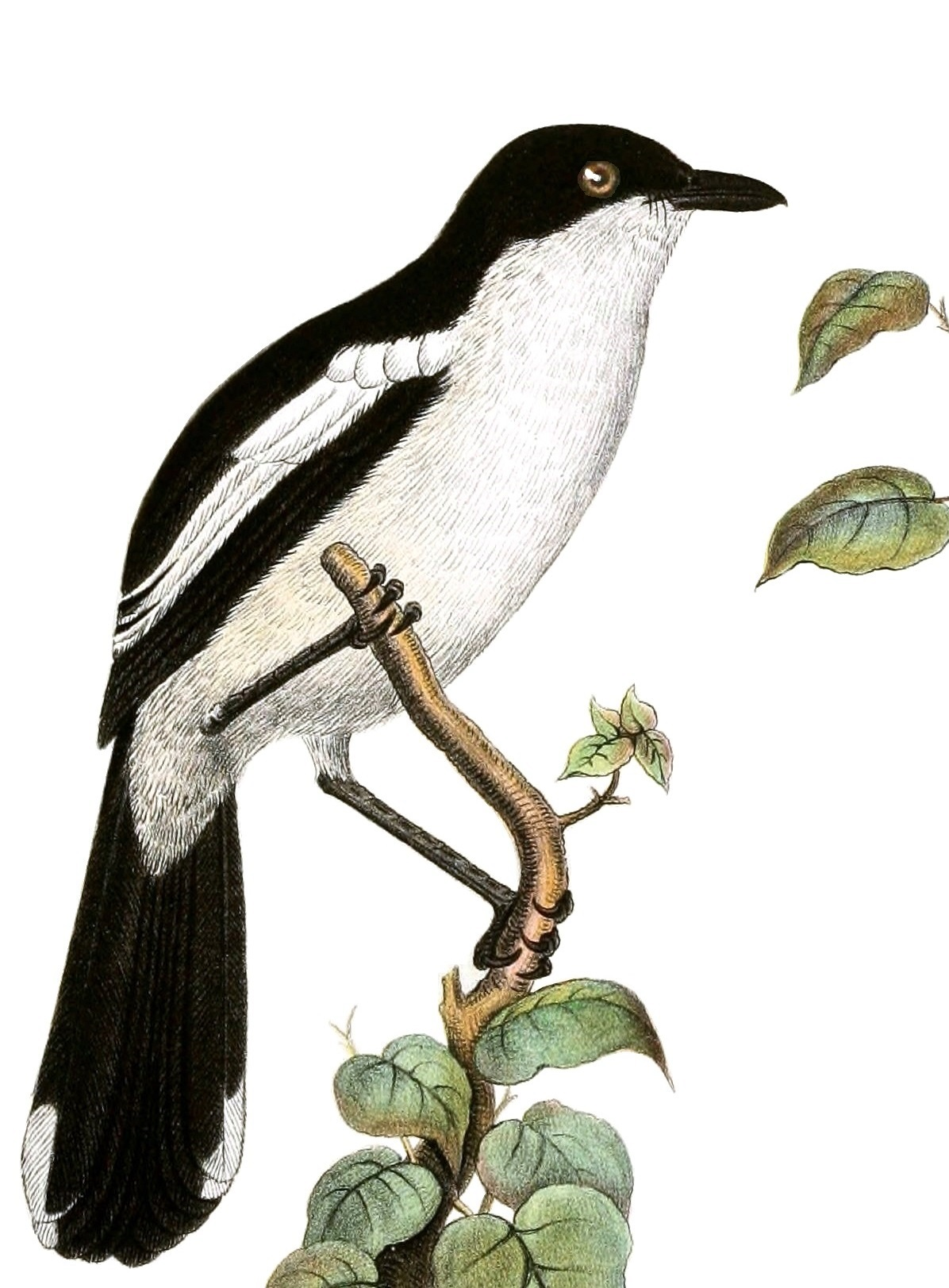 Laniarius sticturus Nob. = Laniarius bicolor sticturus[1]